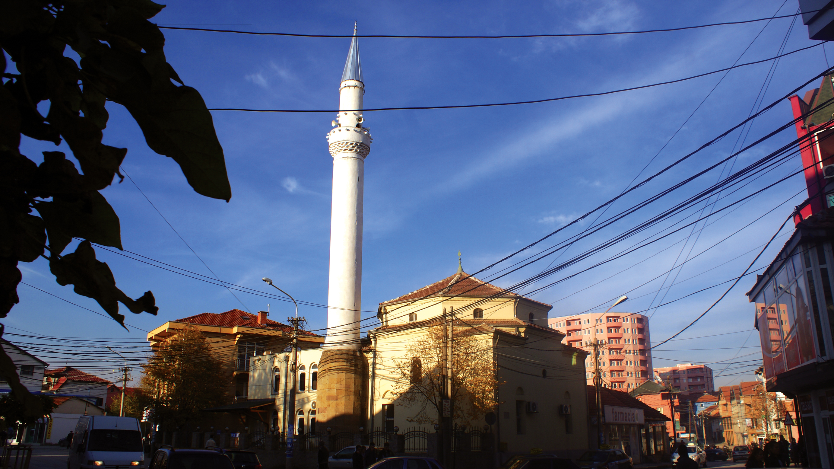 Atik Xhamia